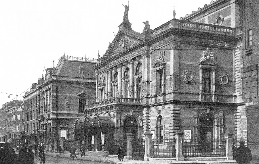 De Rotterdamse Schouwburg in de Aert van Nesstraat in Rotterdam. Foto uit nl:1930, fotograaf onbekend.